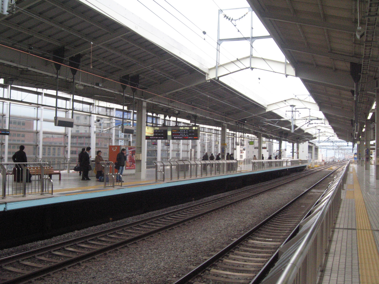 Kyoto Station, Kyoto, Kansai Region.